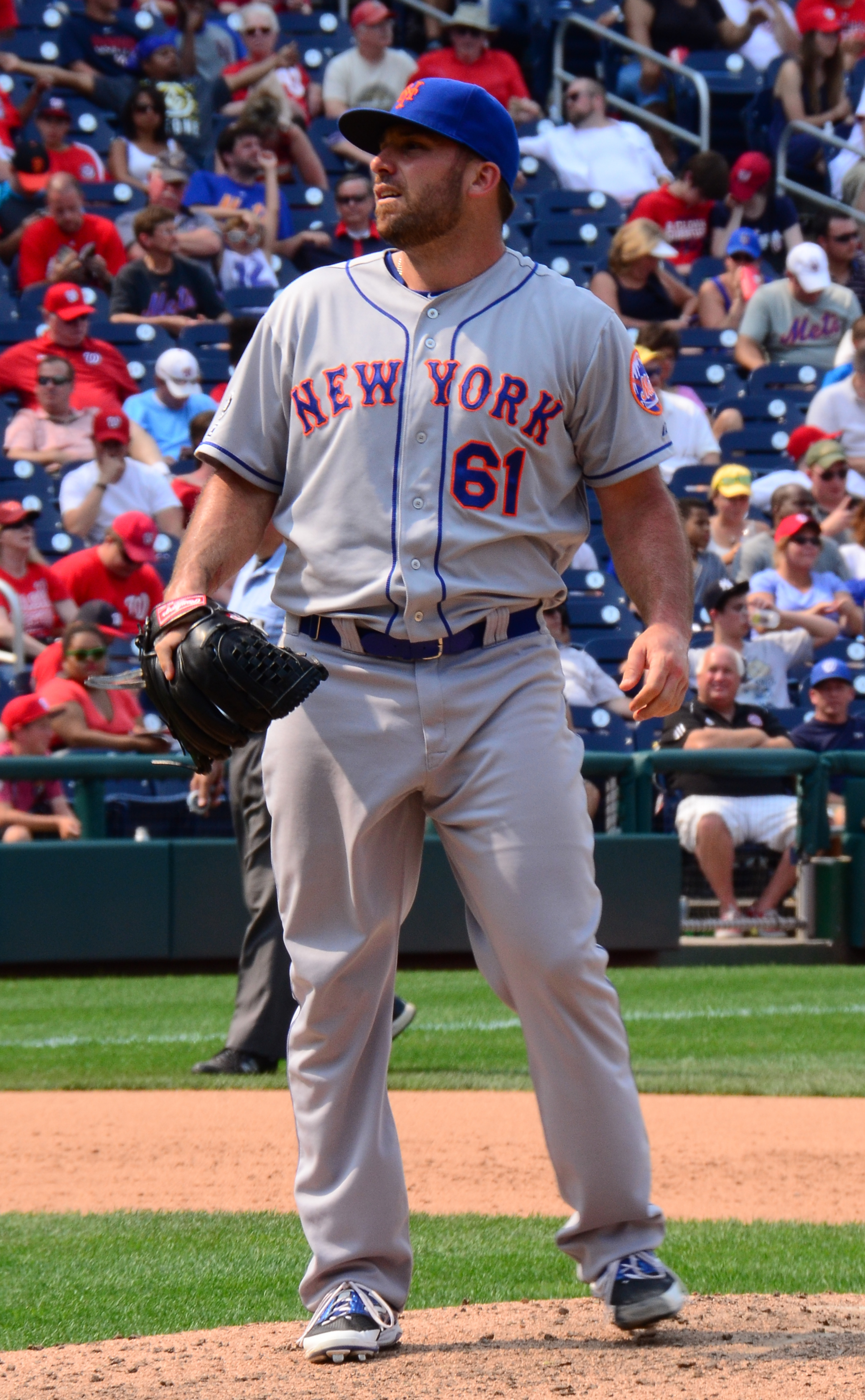 Dana Eveland